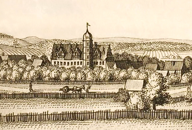 Bündheimer Schloss